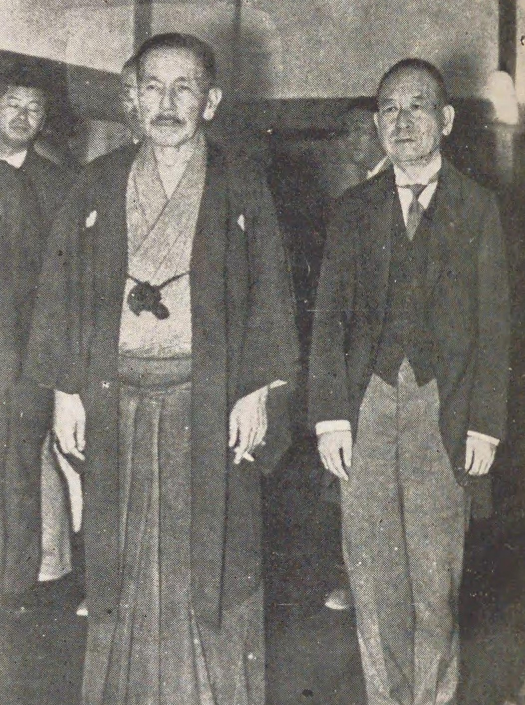 望月圭介と岡田啓介